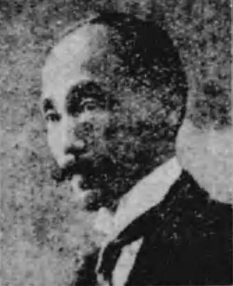 安達峰一郎